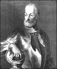 Collaltino di Collalto (1523-1569, aimé par Gaspara Stampa) gravure, Milan, Civica Raccolta delle Stampe "A. Bertarelli"